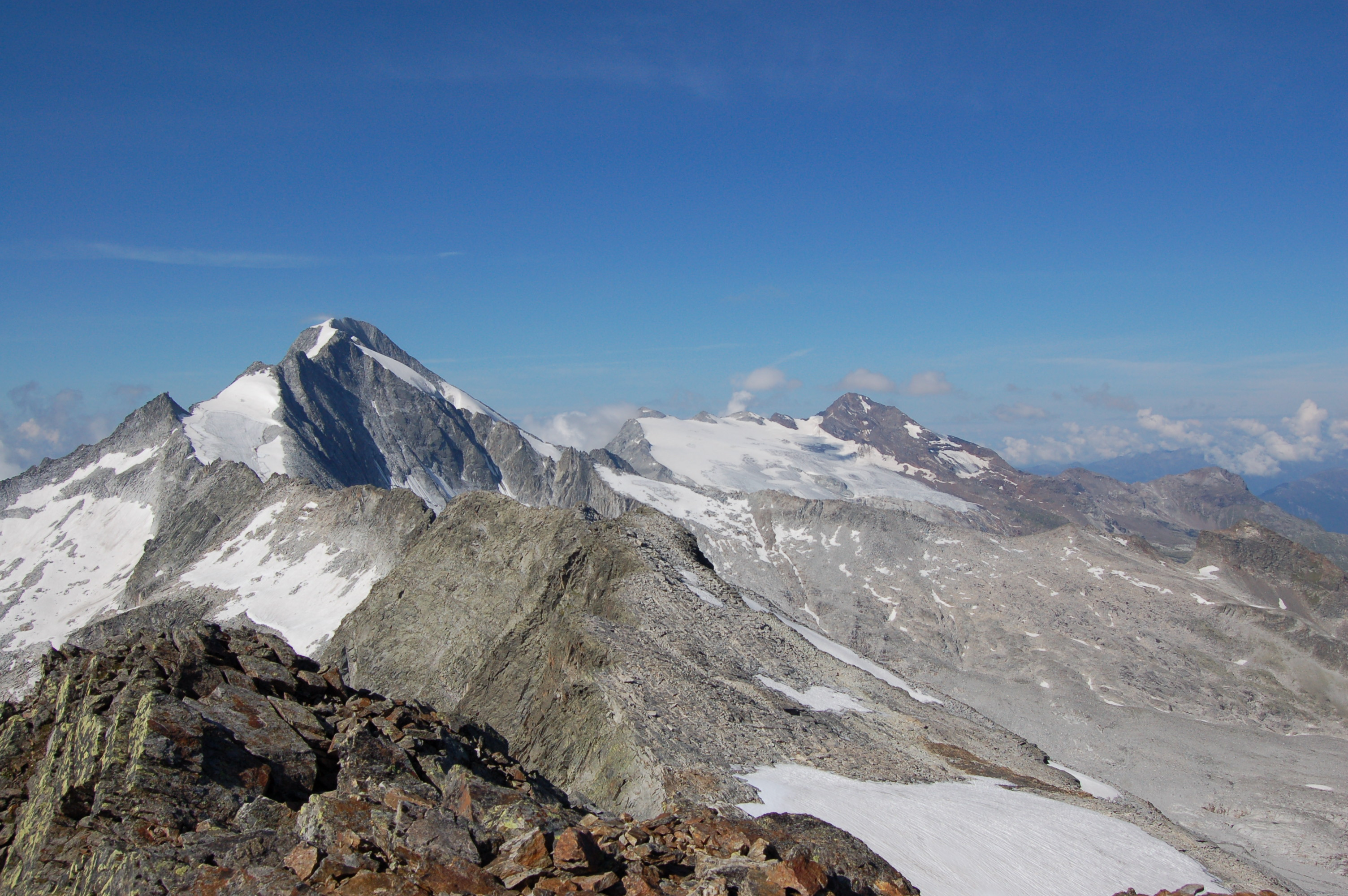 Blick vom Fenneregg auf Barmer Spitze, Hochgall und Östlichen Rieserferner in der Rieserfernergruppe. This file shows the National Park Hohe Tauern in Austria.